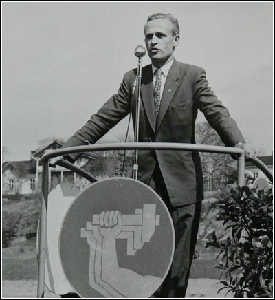 Viljo Kuukkanen puhuu SAK:n vapputapahtumassa Imatralla 1961